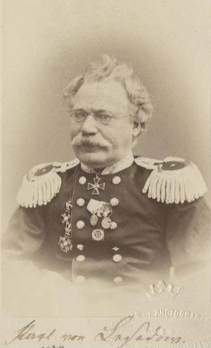 Karl Peter August von Lesedow (Karl Ivanovich Lesedow; 1810–1892), kaiserlich russischer Militärarzt und Wirklicher Staatsrat.